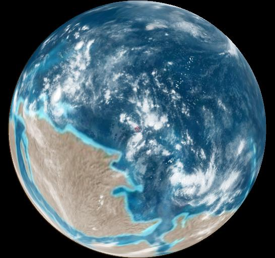 An douer e-pad an ediakarieg